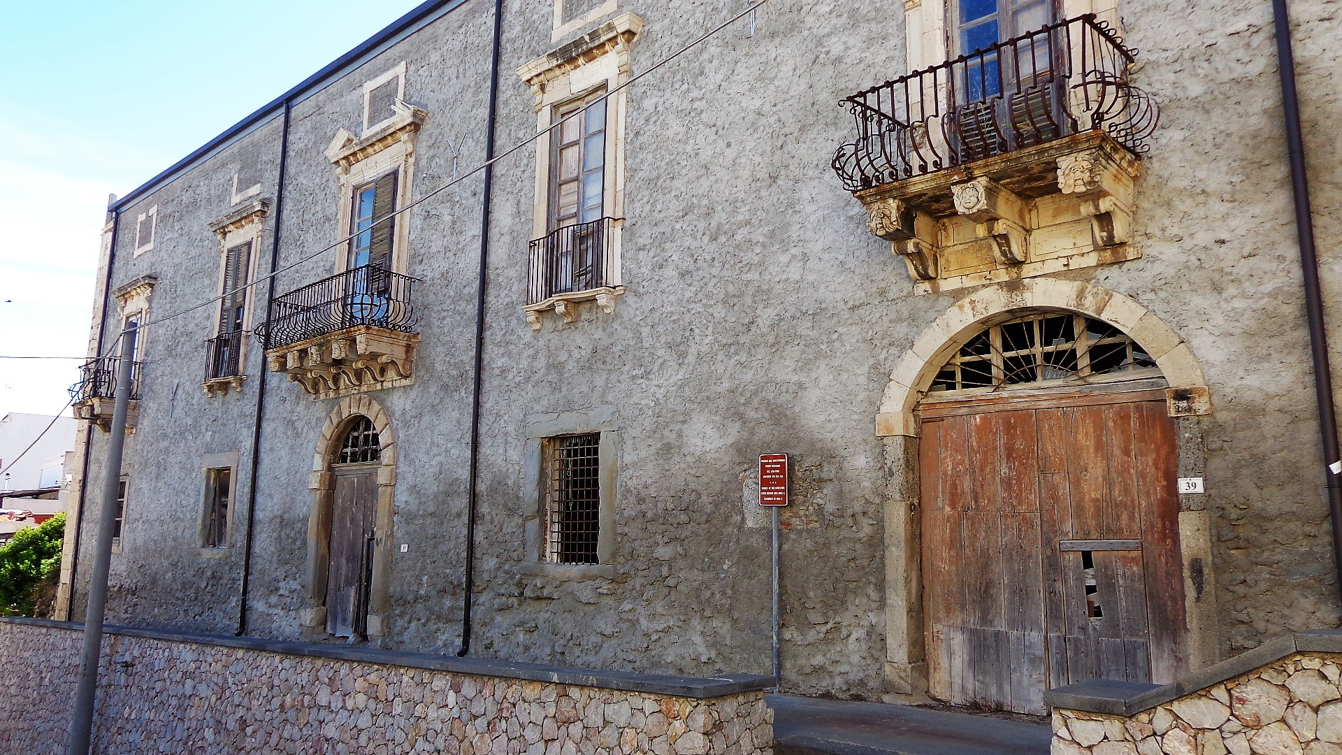 Palazzo dei Giurati